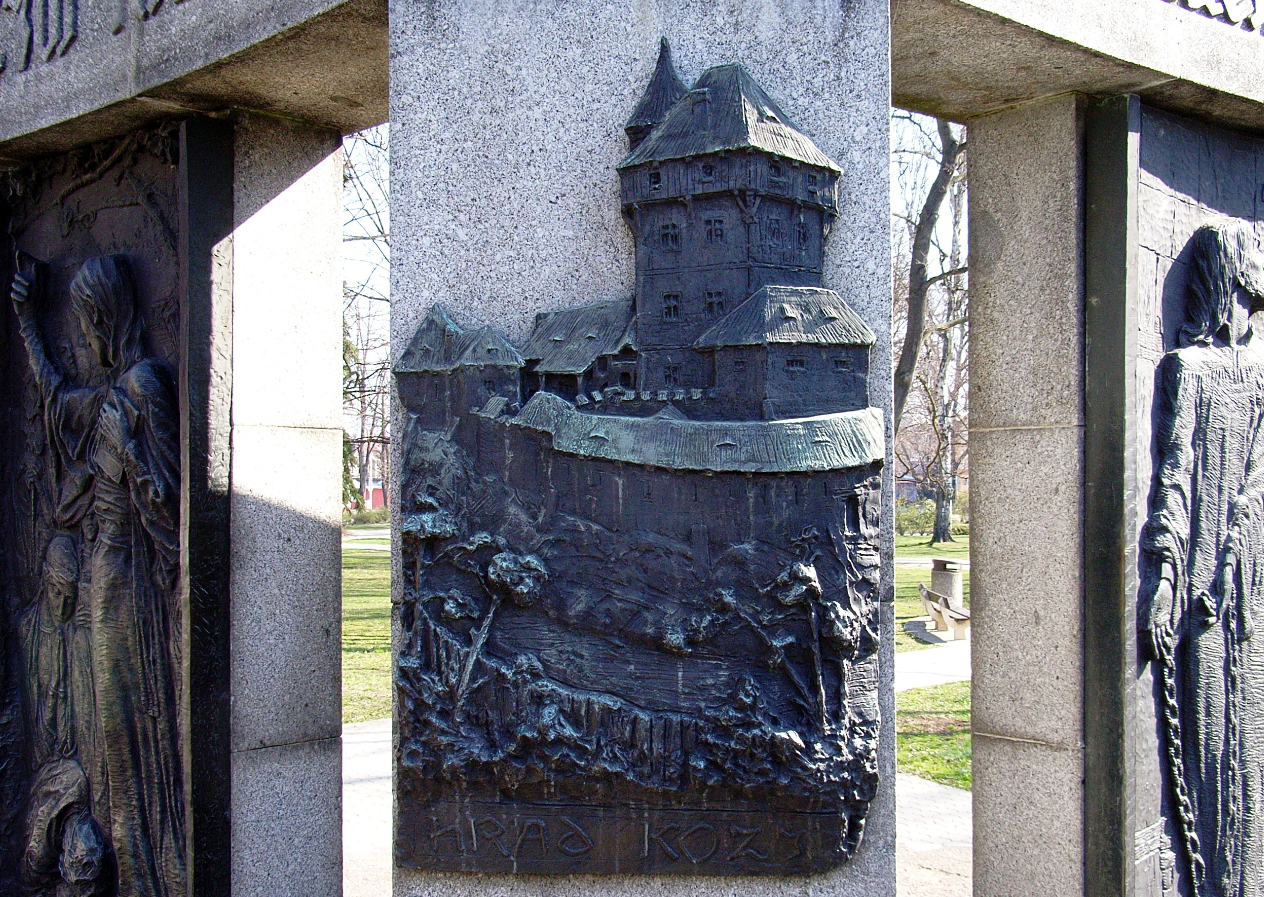 foto detailu-Pomník M. J. Husa v Táboře.